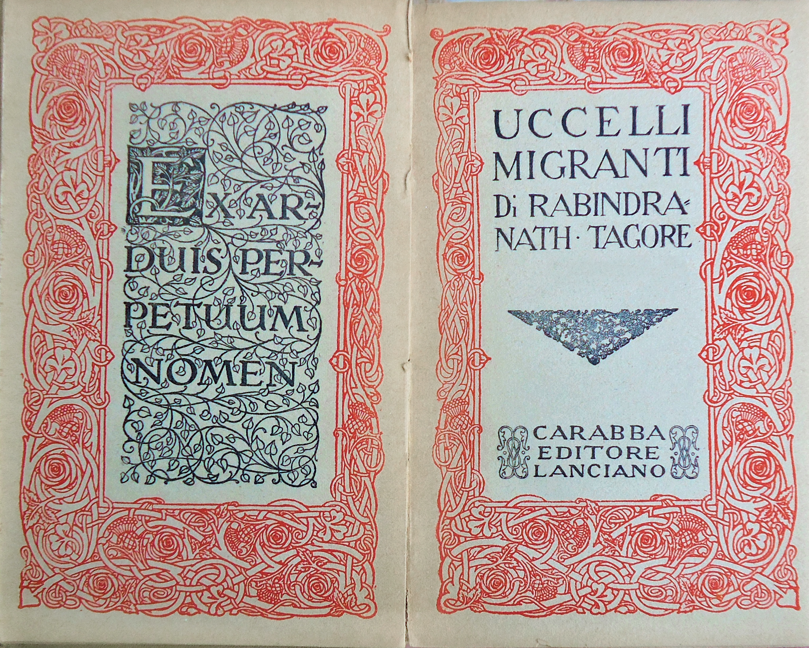 Collana Scrittori italiani e stranieri. Introduzione di Eduardo Taglialatela.